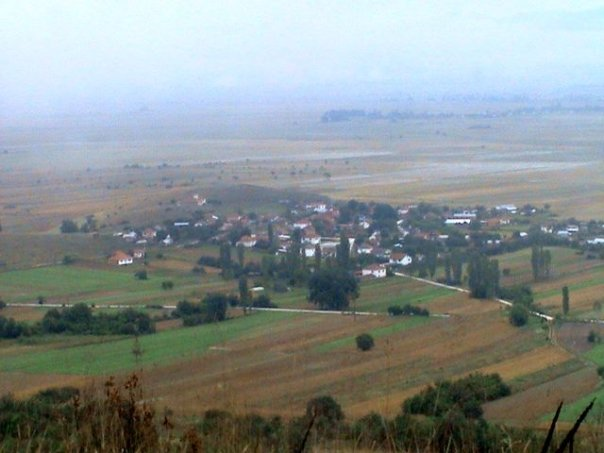 Село Подвис